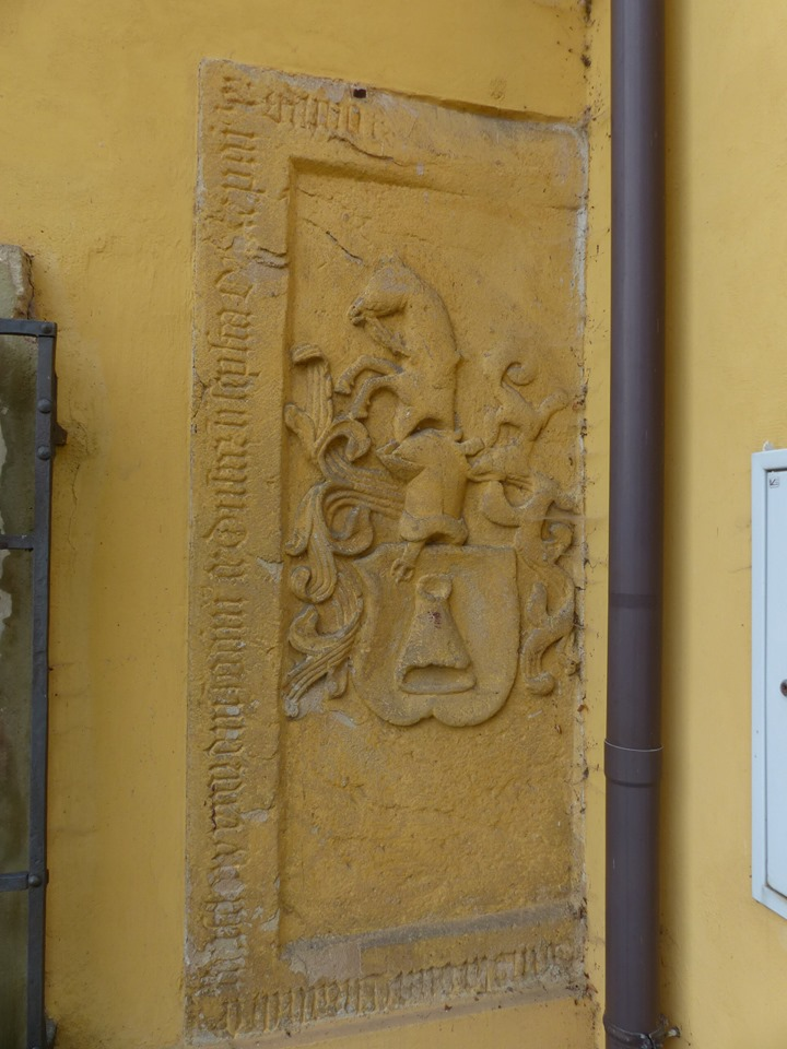 Fotografie náhrobku v kostele Povýšení svatého Kříže ve Vinoři zazděný druhotně z vnější strany sakristie.